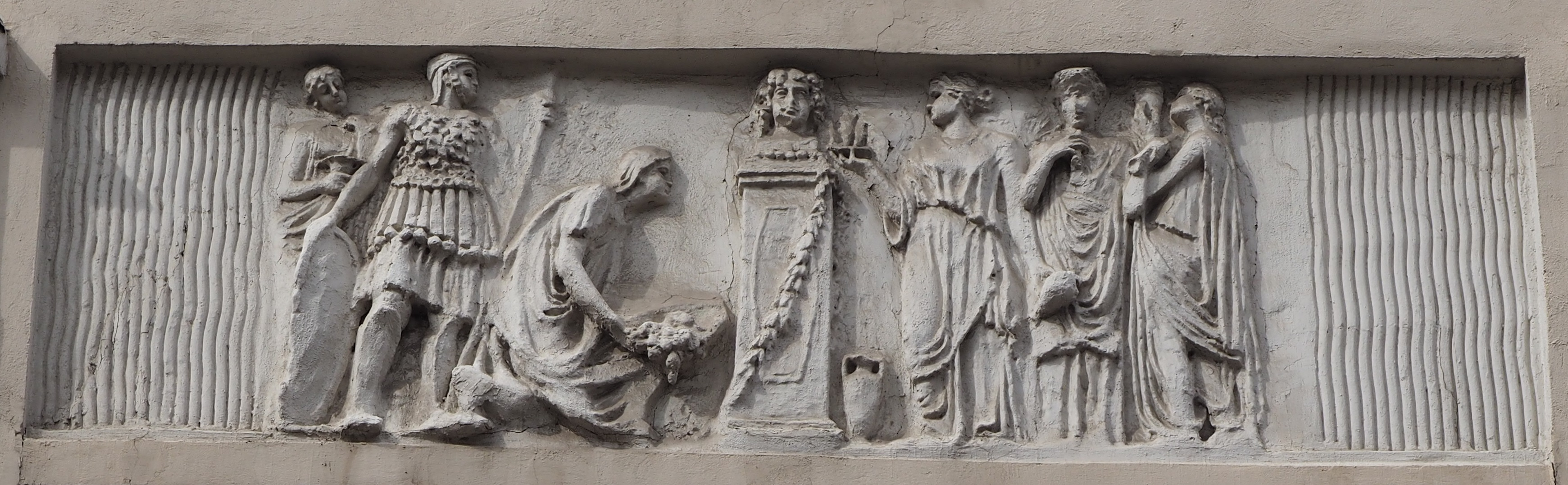 Барельеф на античные темы на фасаде дома 8 по Голиковскому переулку.